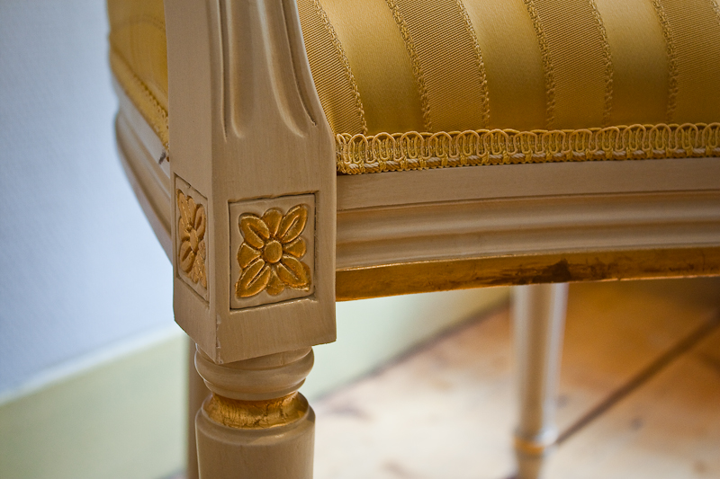 Stijlkamer van het Eysingahuis detail van stoel Stijlkamers van het Eysingahuis